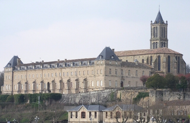 Prieuré de La Réole